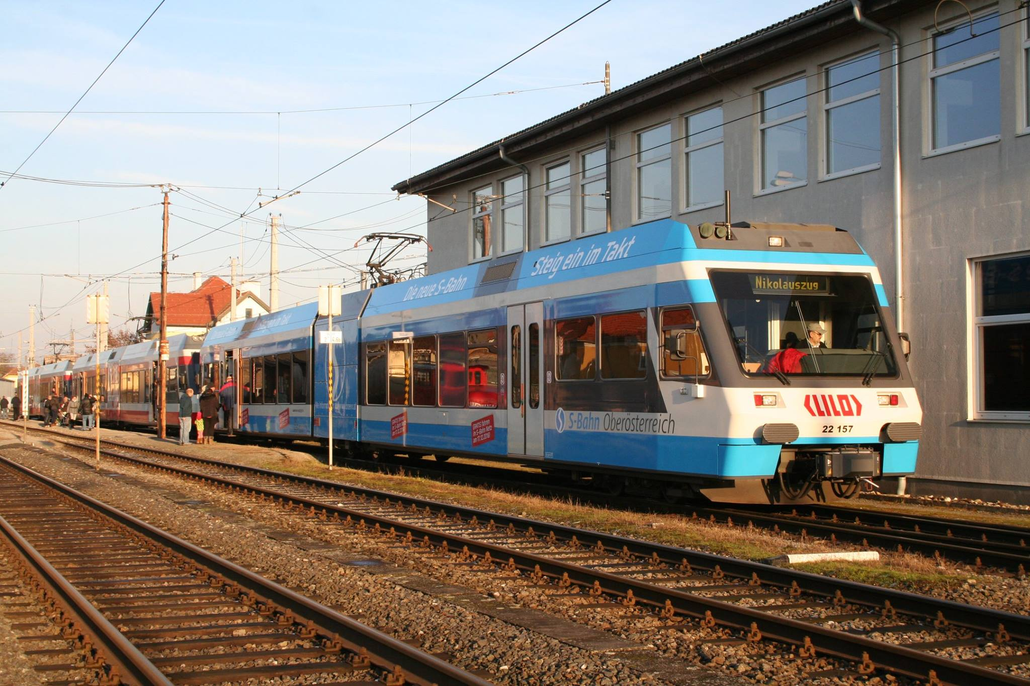 03.12.2016 Nikolauszug der S-Bahn Oberösterreich